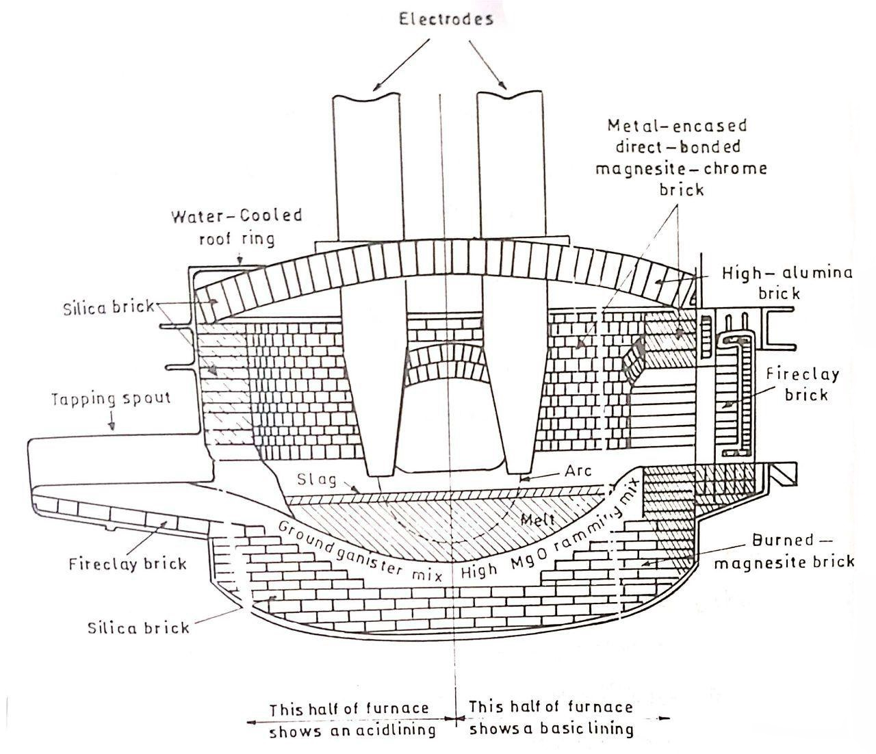 برش عرضی کوره قوس الکتریکی